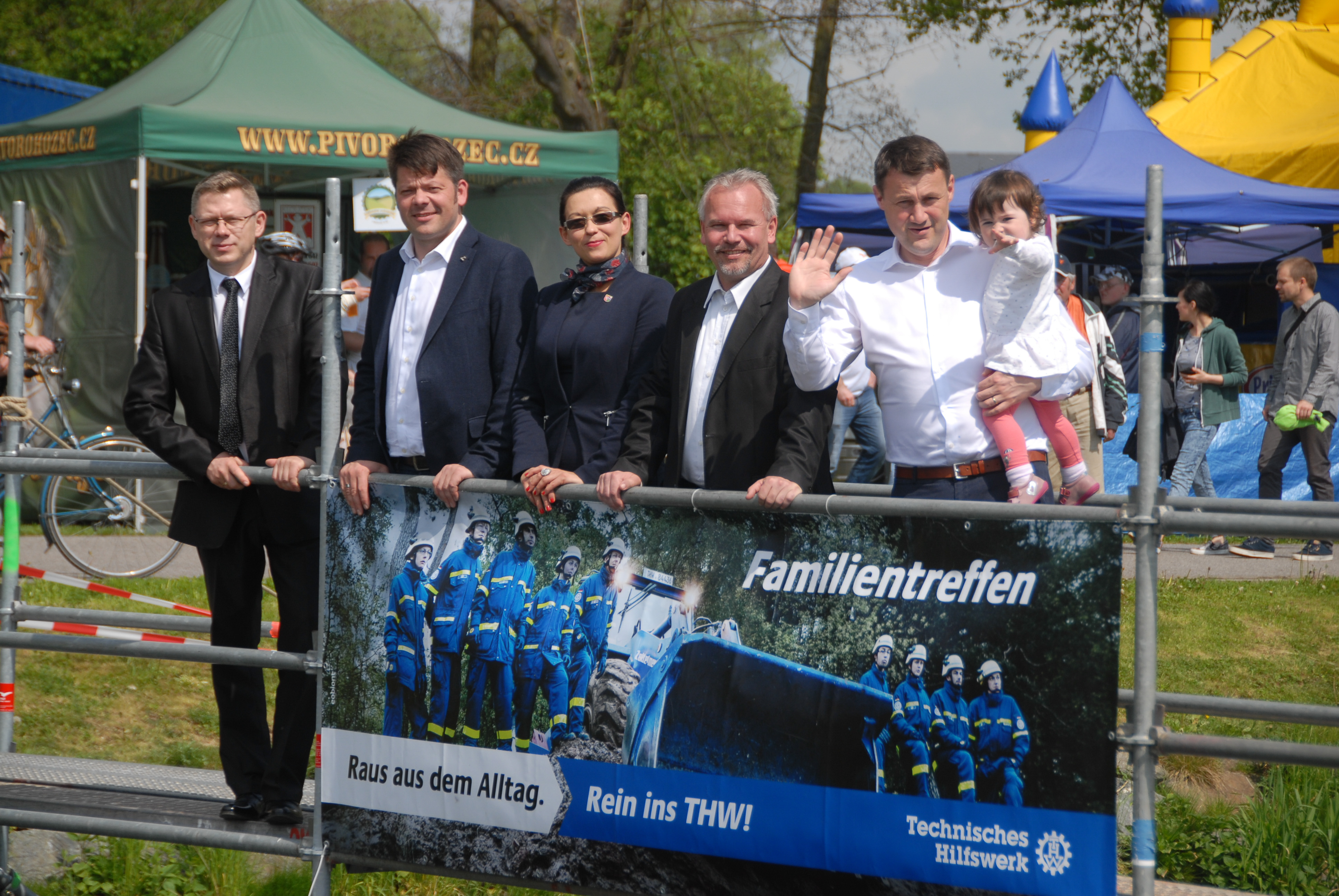 Auf dem Dreiländereckfest 2017 kamen Vertreter der polnischen Seite (l. & 3.v.l.) der deutschen Seite mit Zittaus Oberbürgermeister Thomas Zenker (2.v.l.) und tschechischer Seite mit Hrádeks Bürgermeister Josef Horinka (2.v.r.) und dem Hejtman des Kreises Liberec Martin Půta (r.) zusammen. Das Kind ist Půtas Tochter.